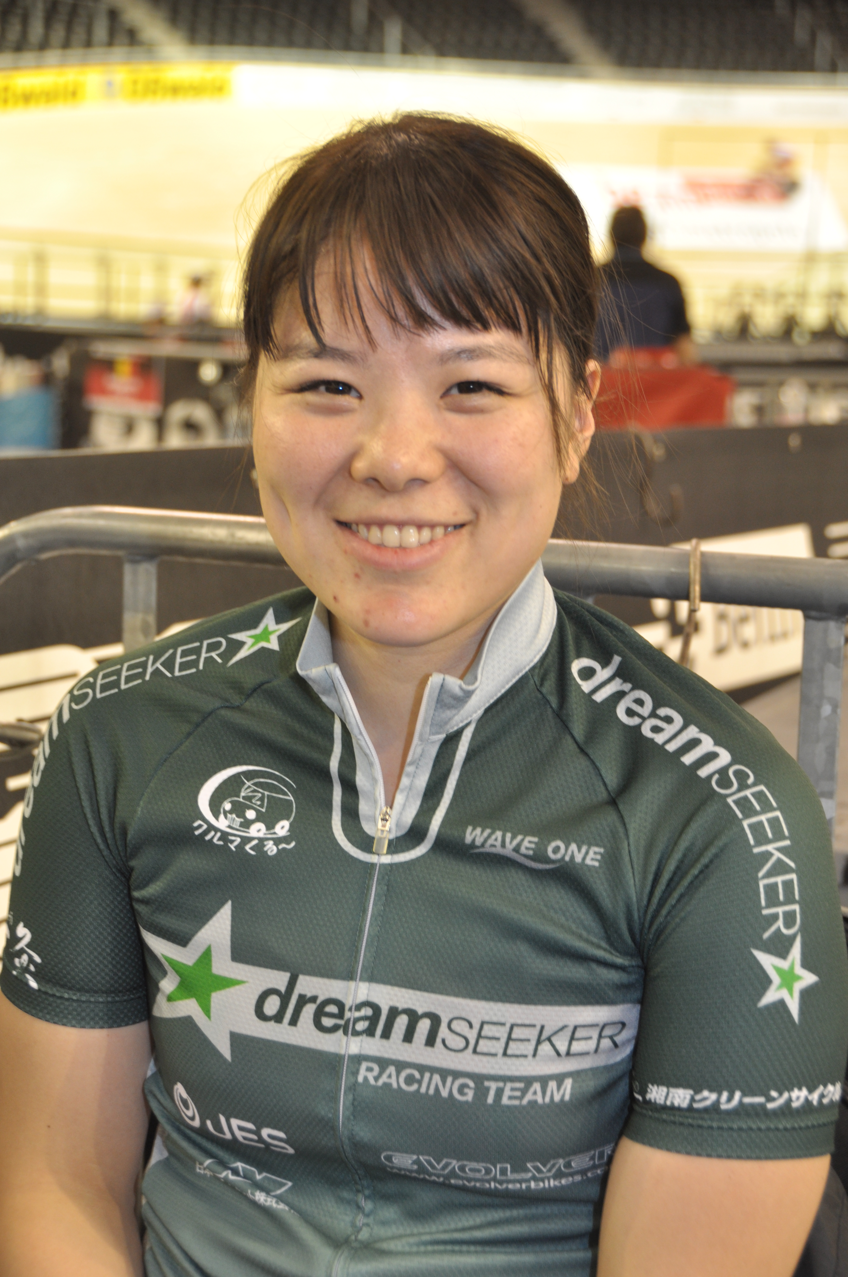 Yuka Kobayashi, japanische Radsportlerin